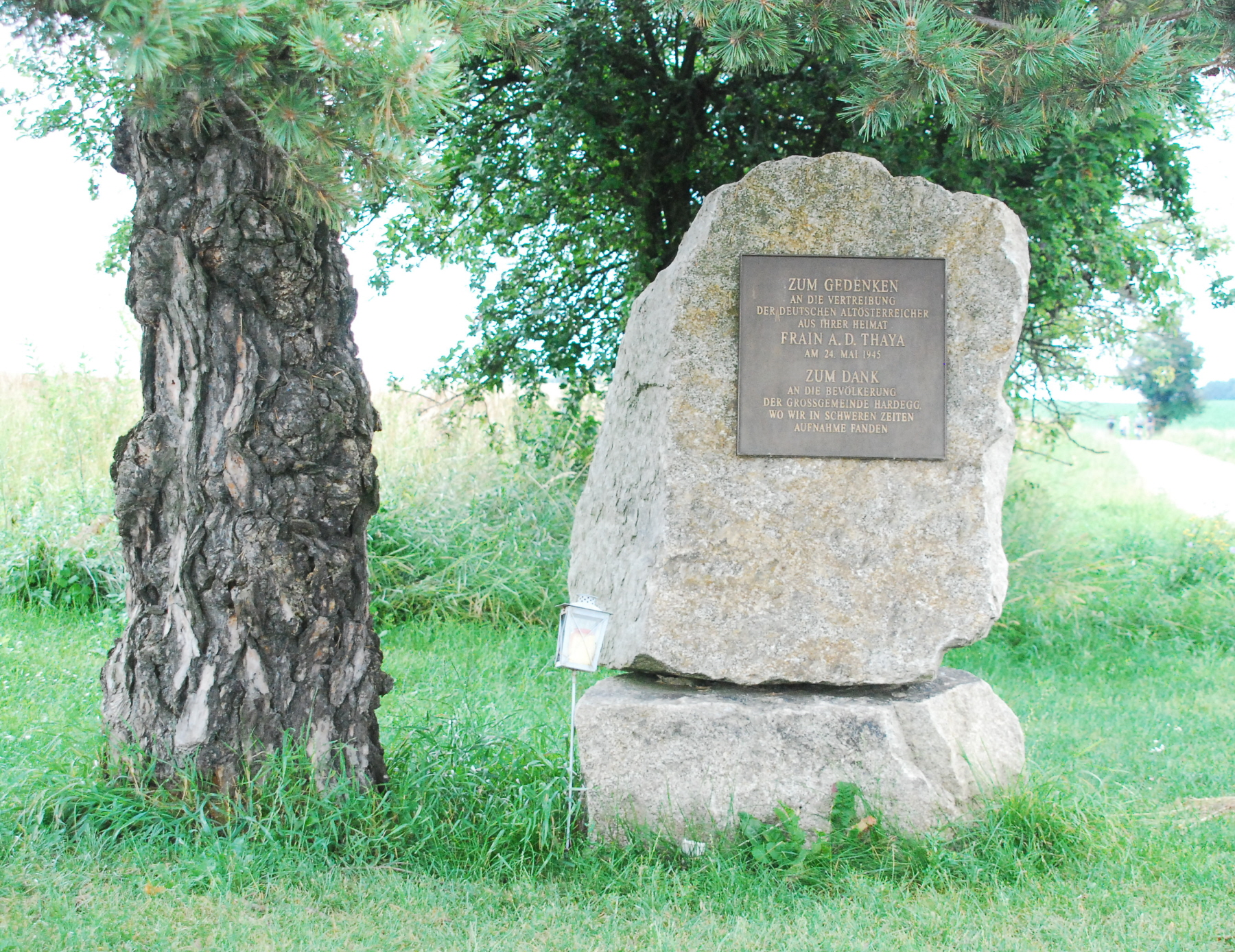 Gedenkstein der Heimatvertriebenen Frainer in Felling (Stadtgemeinde Hardegg, Niederösterreich)